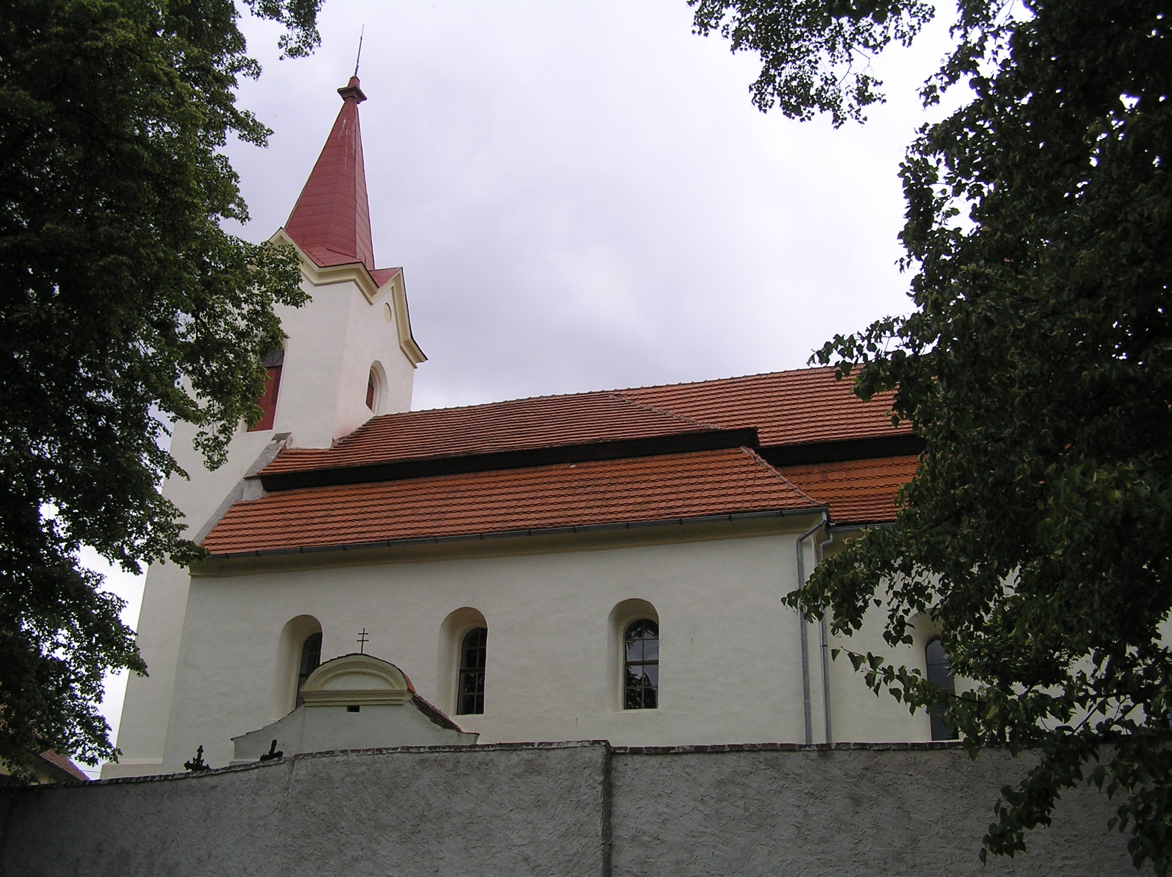 Kostel svatých Petra a Pavla, náves, Šlapánov.